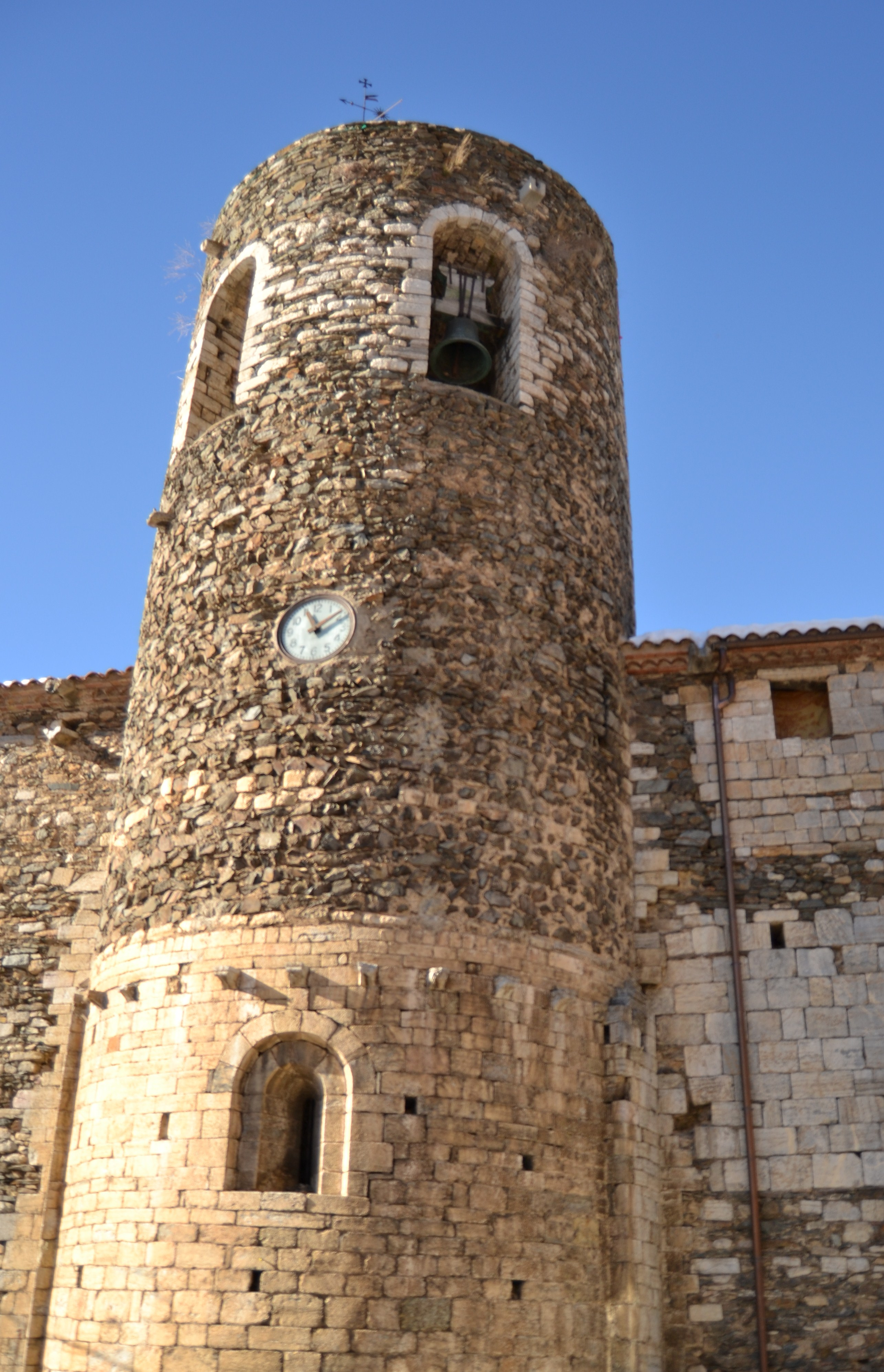 Iglesia de Sant Esteve en Pardines, Cataluña, España